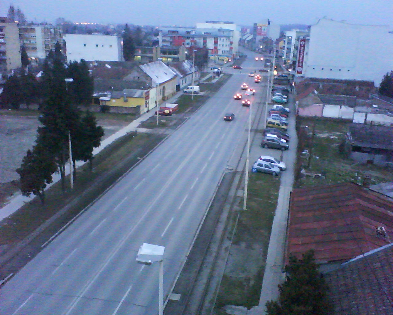 Pogled na Retfalu, ulica J. J. Strossmayera. Veljača, 2011.